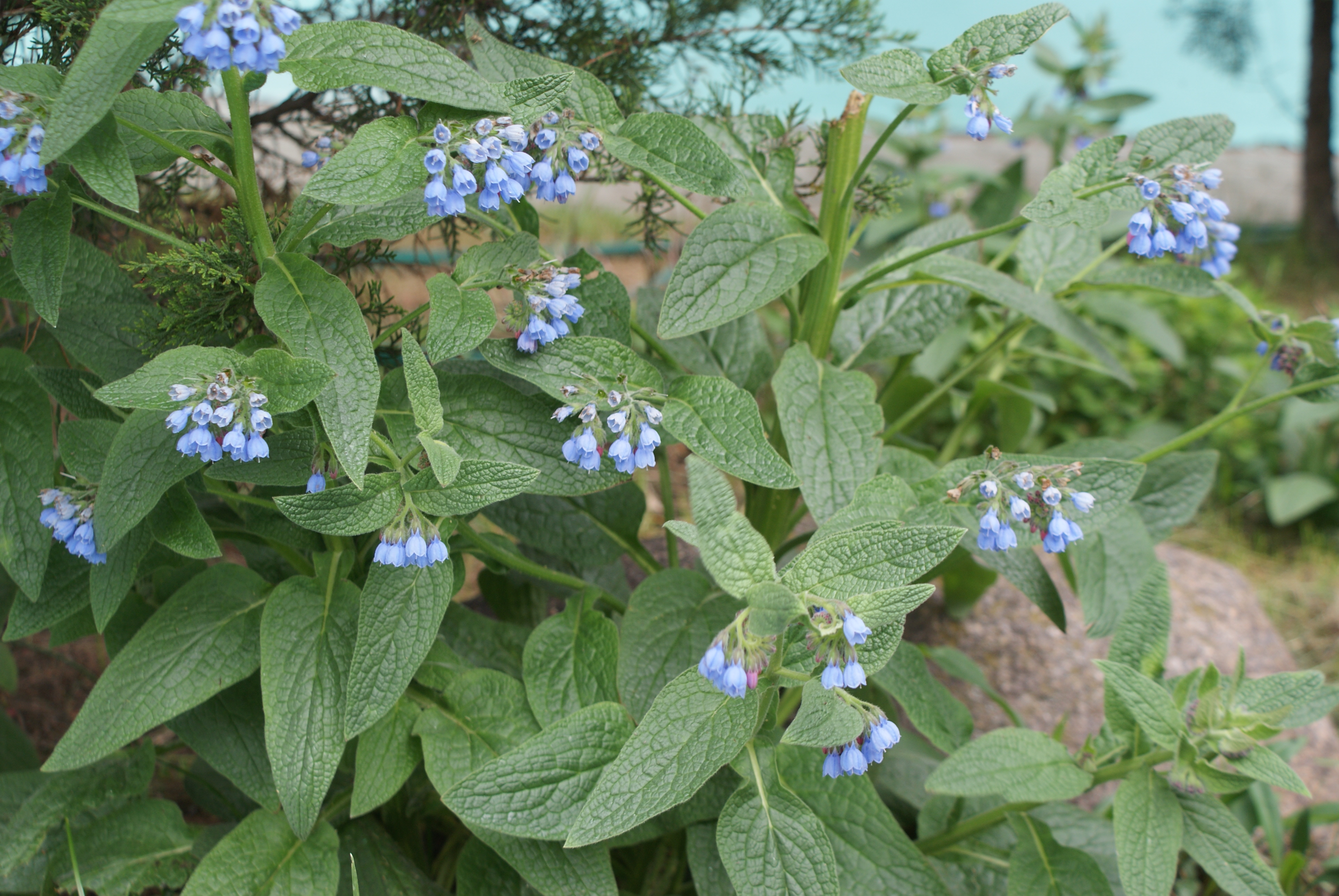 Кветка ў Мінску